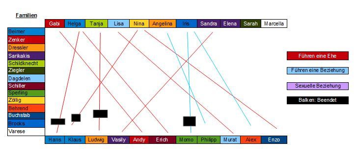 Tabelle der Beziehungen zwischen den Serienfiguren in der ARD-Fernsehserie »Lindenstraße«